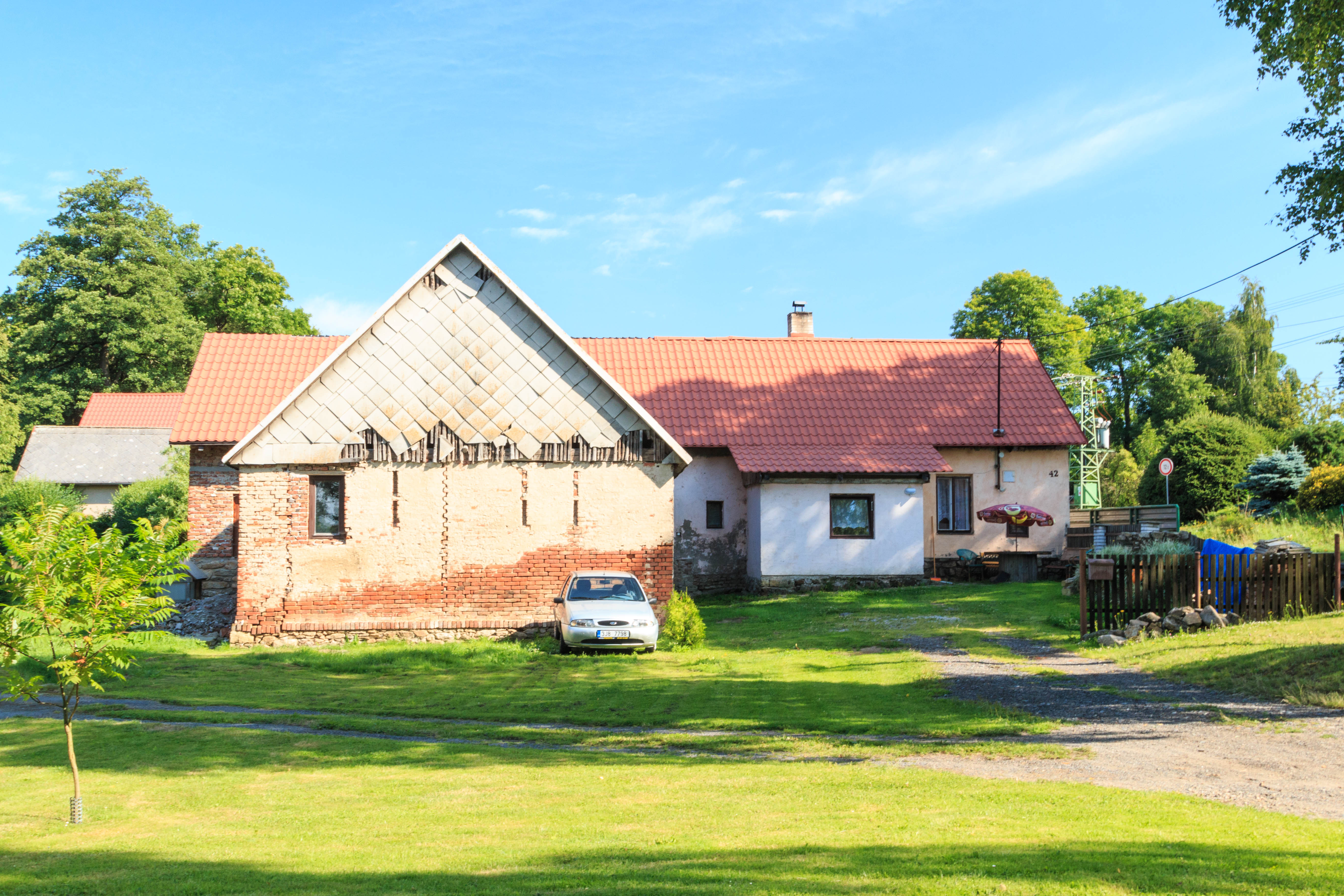 Počátky u Chotěboře - čp. 42